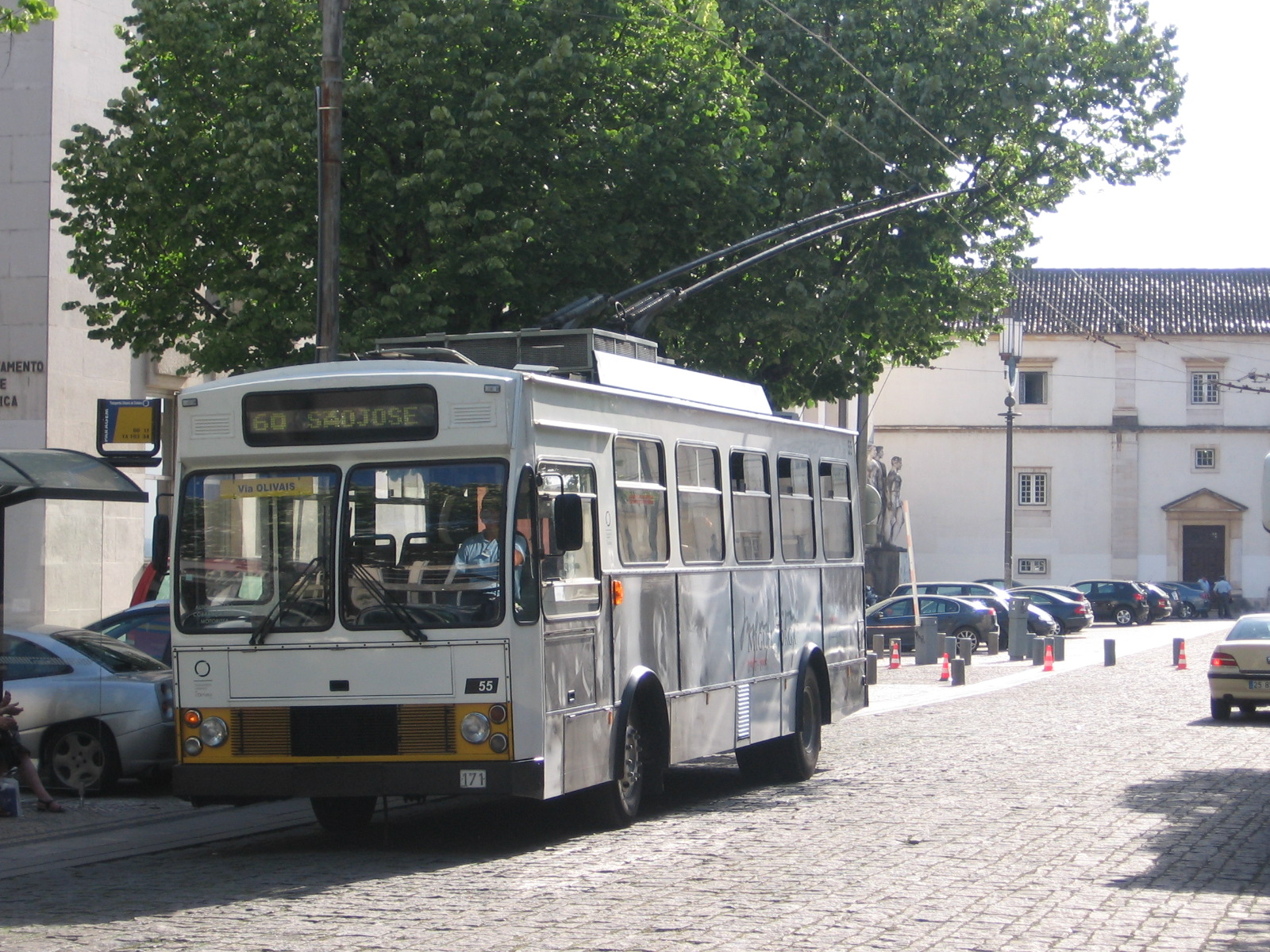 Troleicarro pruduzido pela EFACEC/Salvador Caetano nos anos 80, ainda em serviço na cidade de Coimbra, Portugal